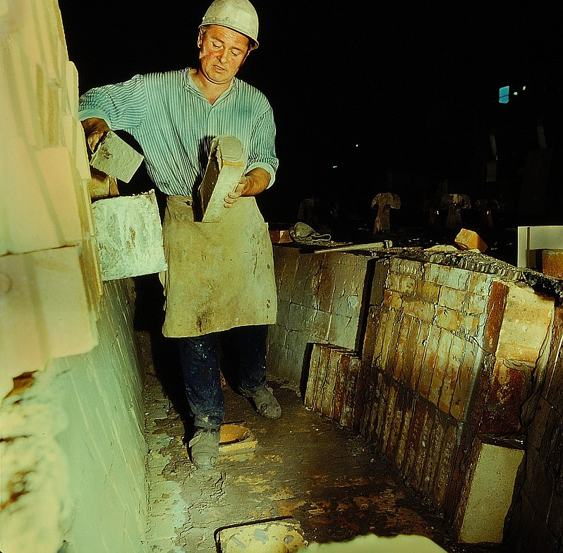 Original image description from the Deutsche FotothekFeuerungs- und Industrieofenbauer